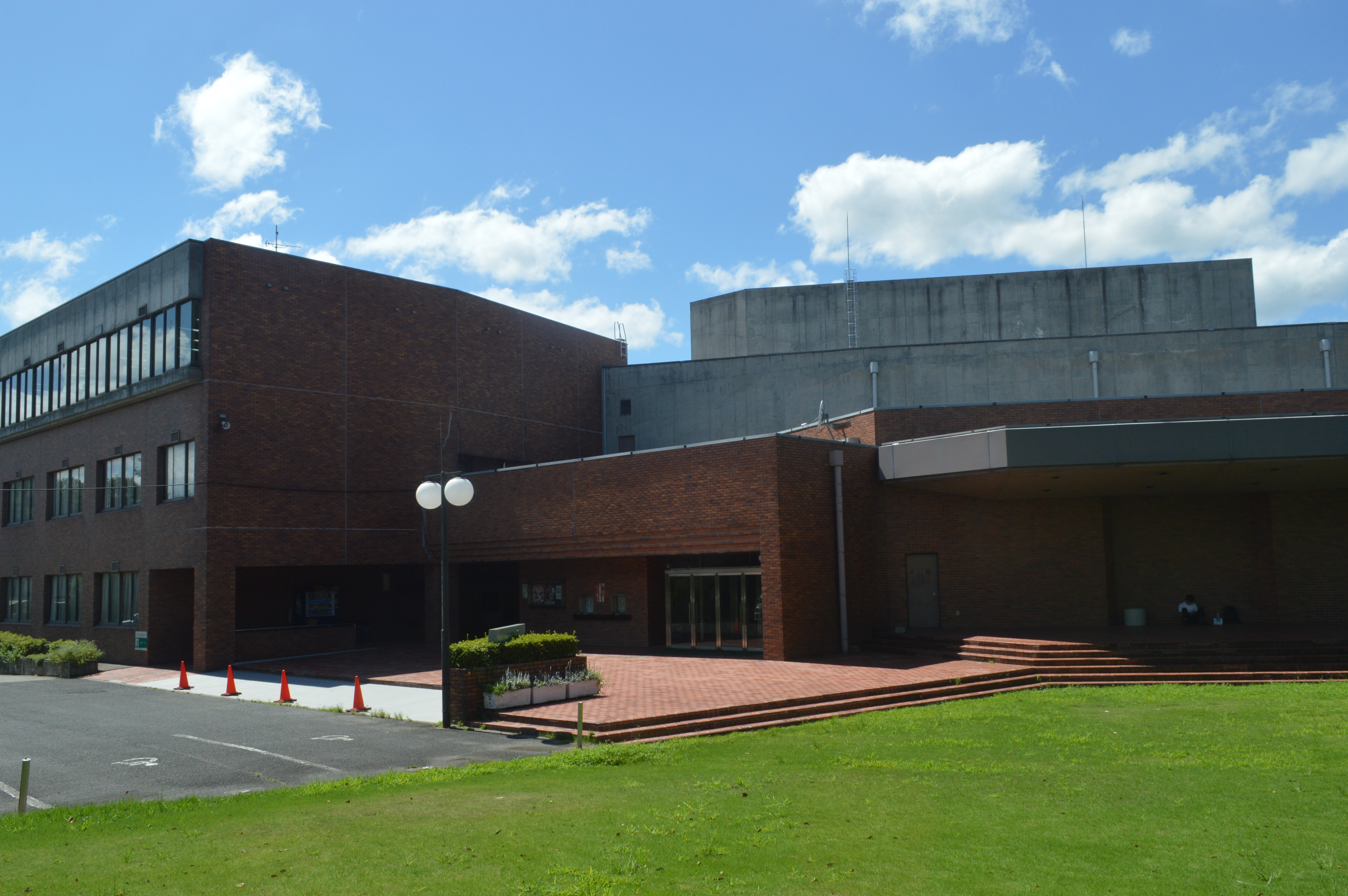 京都府京丹後市にある京都府丹後文化会館。京丹後市中央公民館、京丹後市立峰山図書館などが入っている。